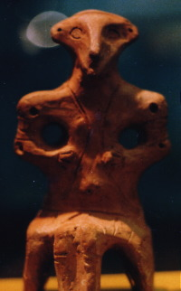 Sitzendes Vinča-Idol, British Museum, London, eigene Aufnahme ca. 1980